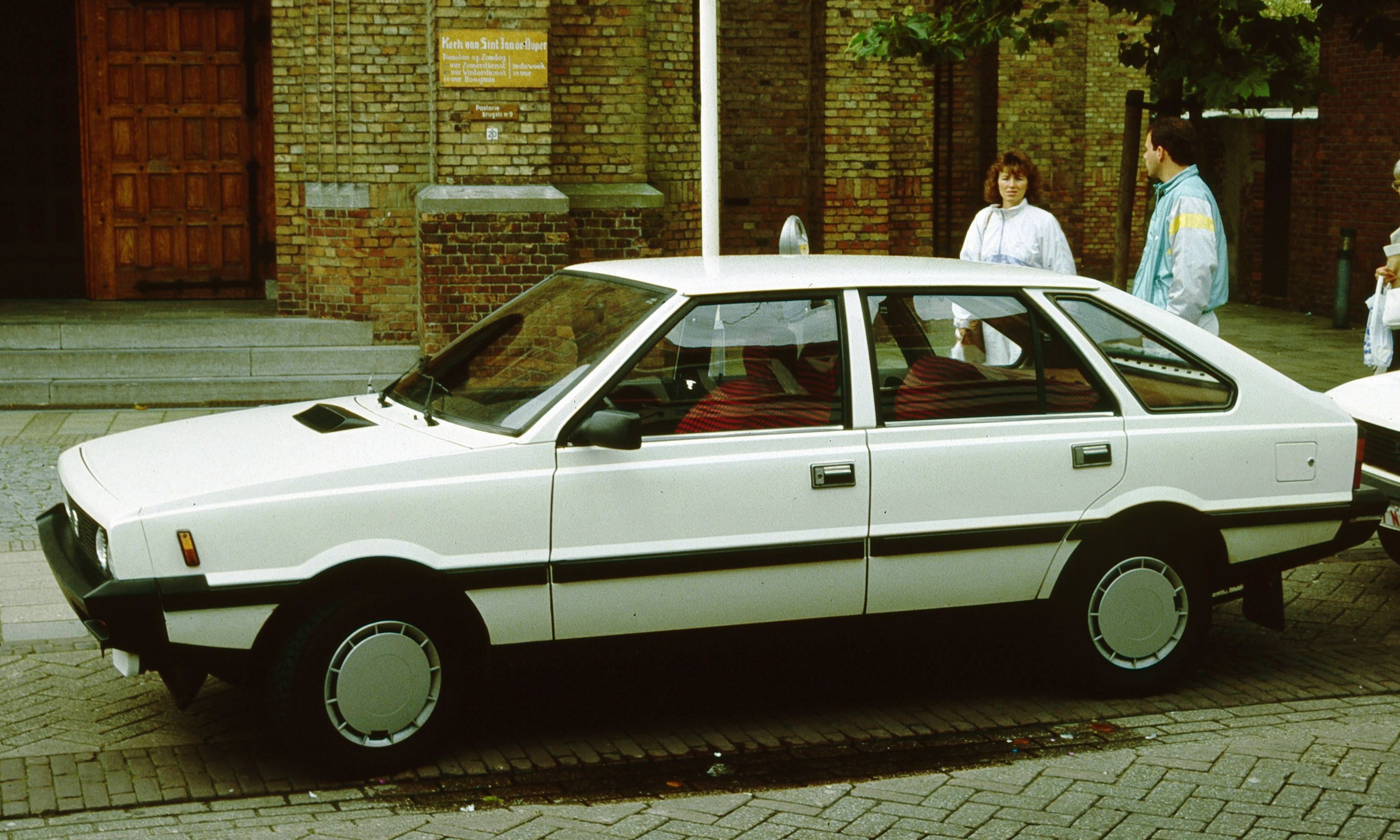 FSO Polonez MR'87 in Utrecht